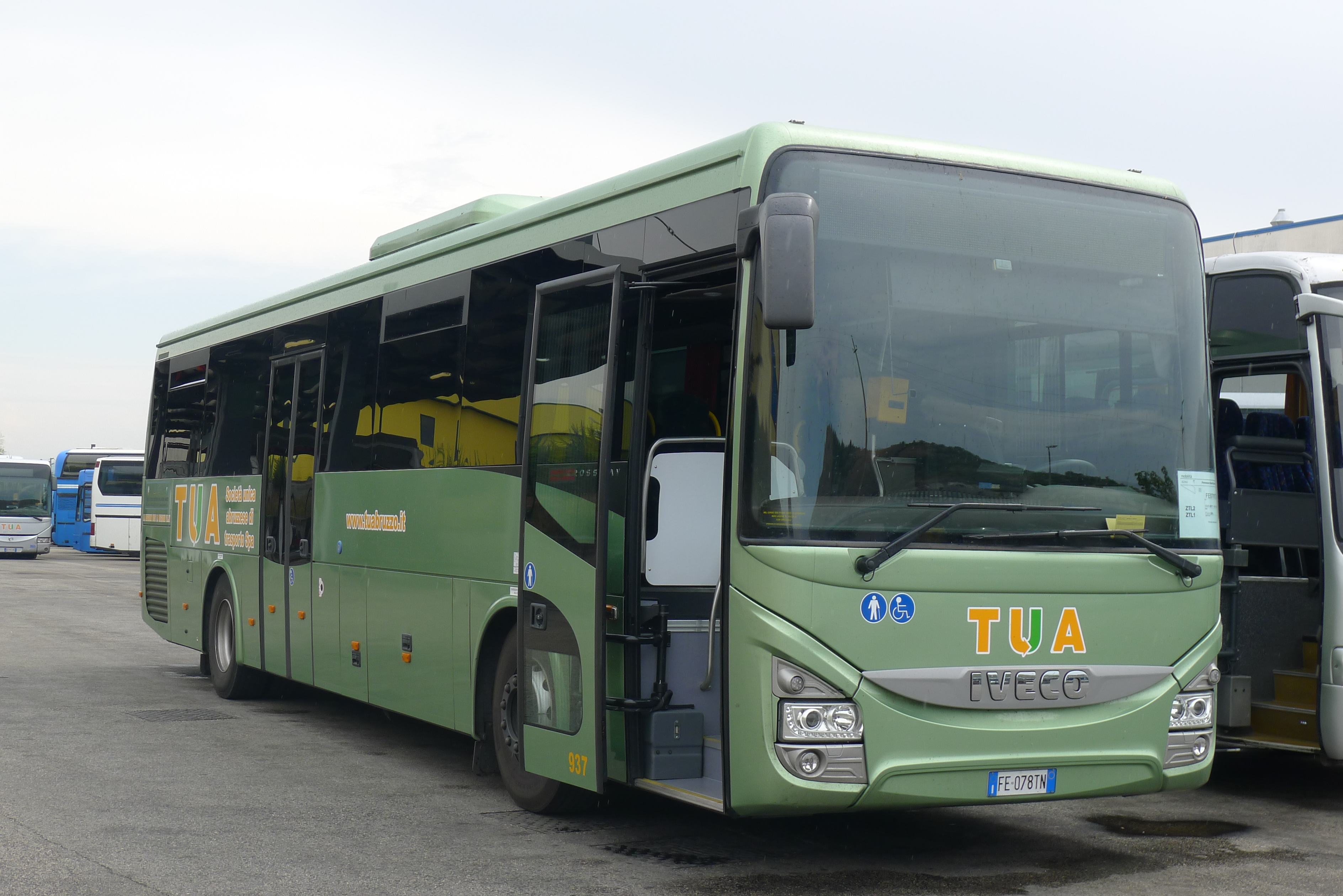 Irisbus Crossway, matricola n. 937, della TUA